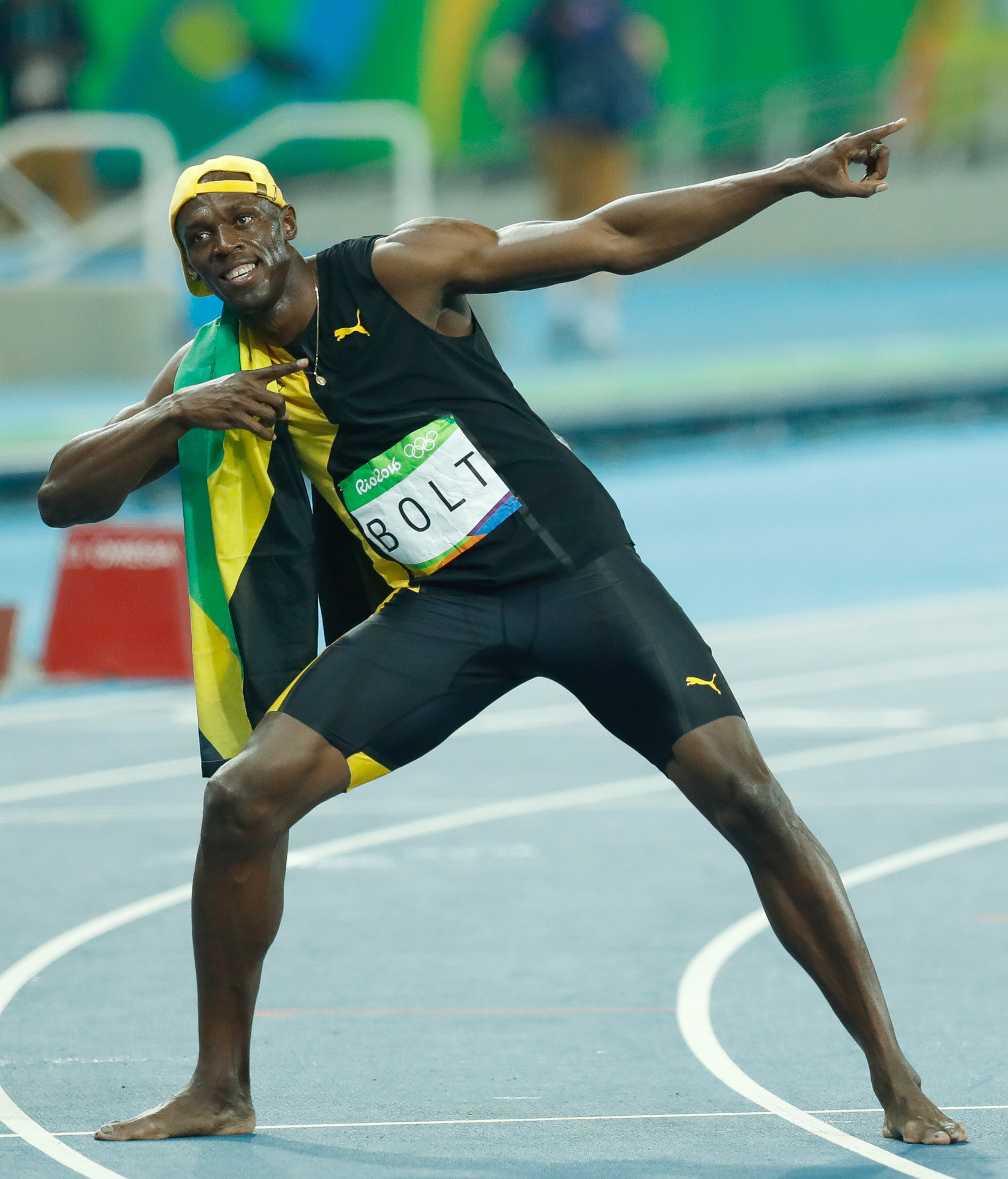 Rio de Janeiro - O jamaicano Usain Bolt, garantiu o ouro e fez história ao conquistar pela terceira vez o título de homem mais rápido do mundo nos 100 metros rasos em uma Olimpíada (Fernando Frazão/Agência Brasil).